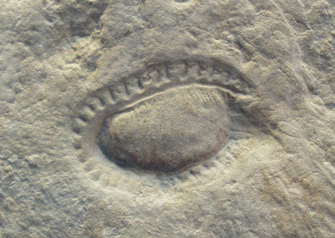 Fossil of Kimberella, an extinct animal. I took the photo at Musee d'Histoire Naturelle, Brussels.